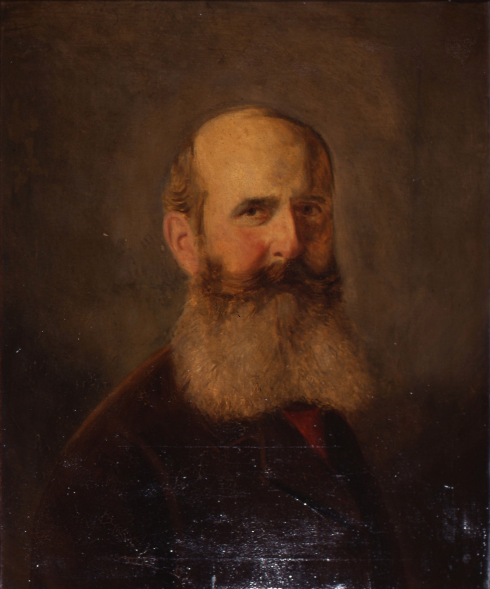 Porträt des Fürsten Alfred Konstantin zu Salm-Salm genaues Datum unbekannt, ca. 1860 - 1886 Öl auf Leinwand